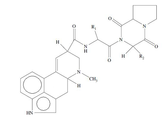 struktoro de ergopeptams